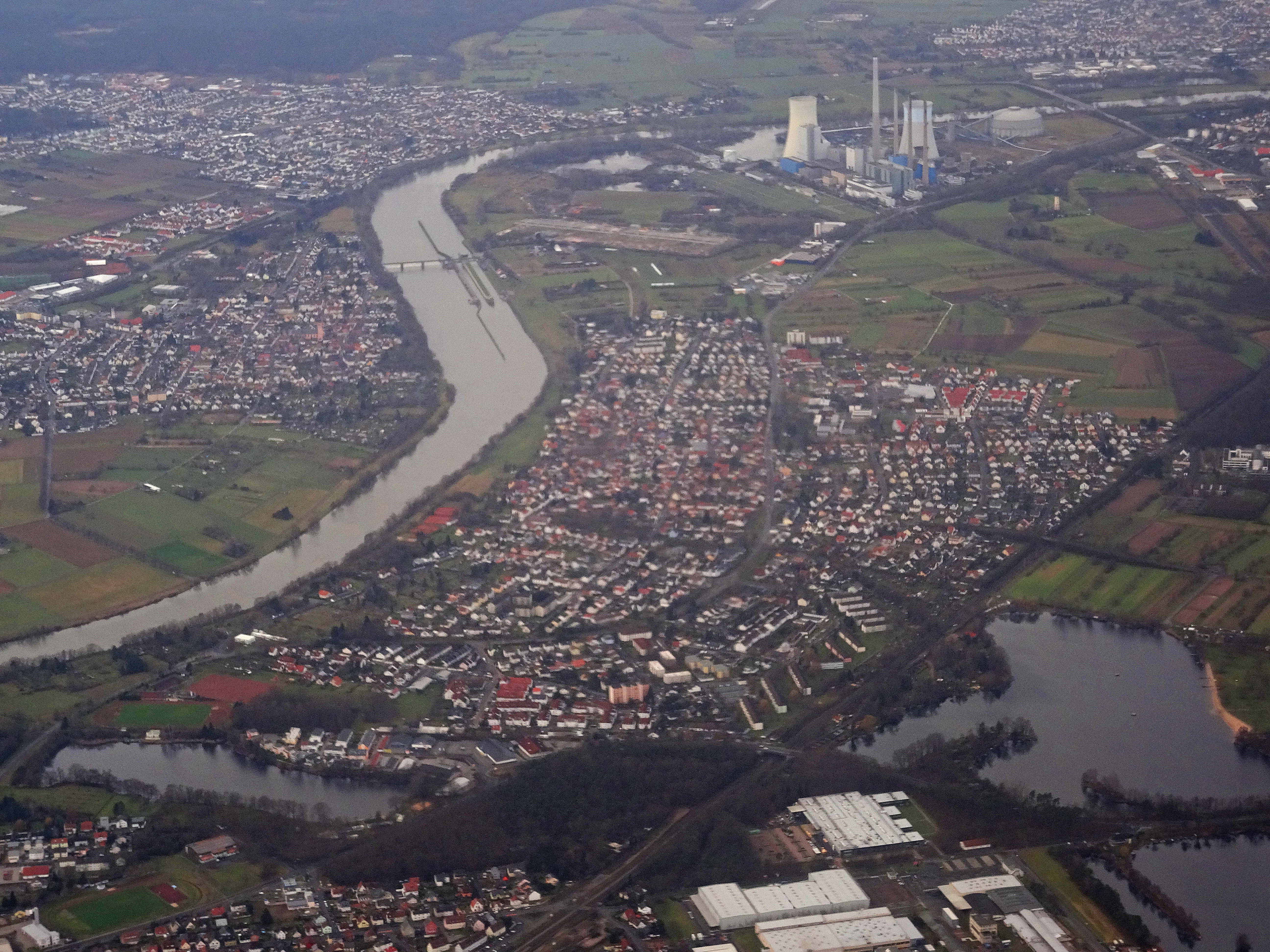 Deutschland: Luftaufnahme von Großkrotzenburg